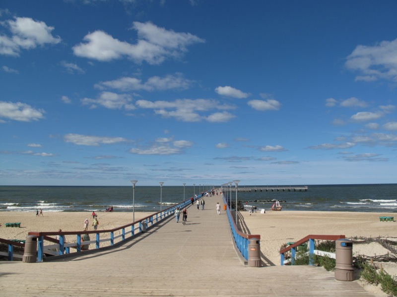 Palanga, Lithuania